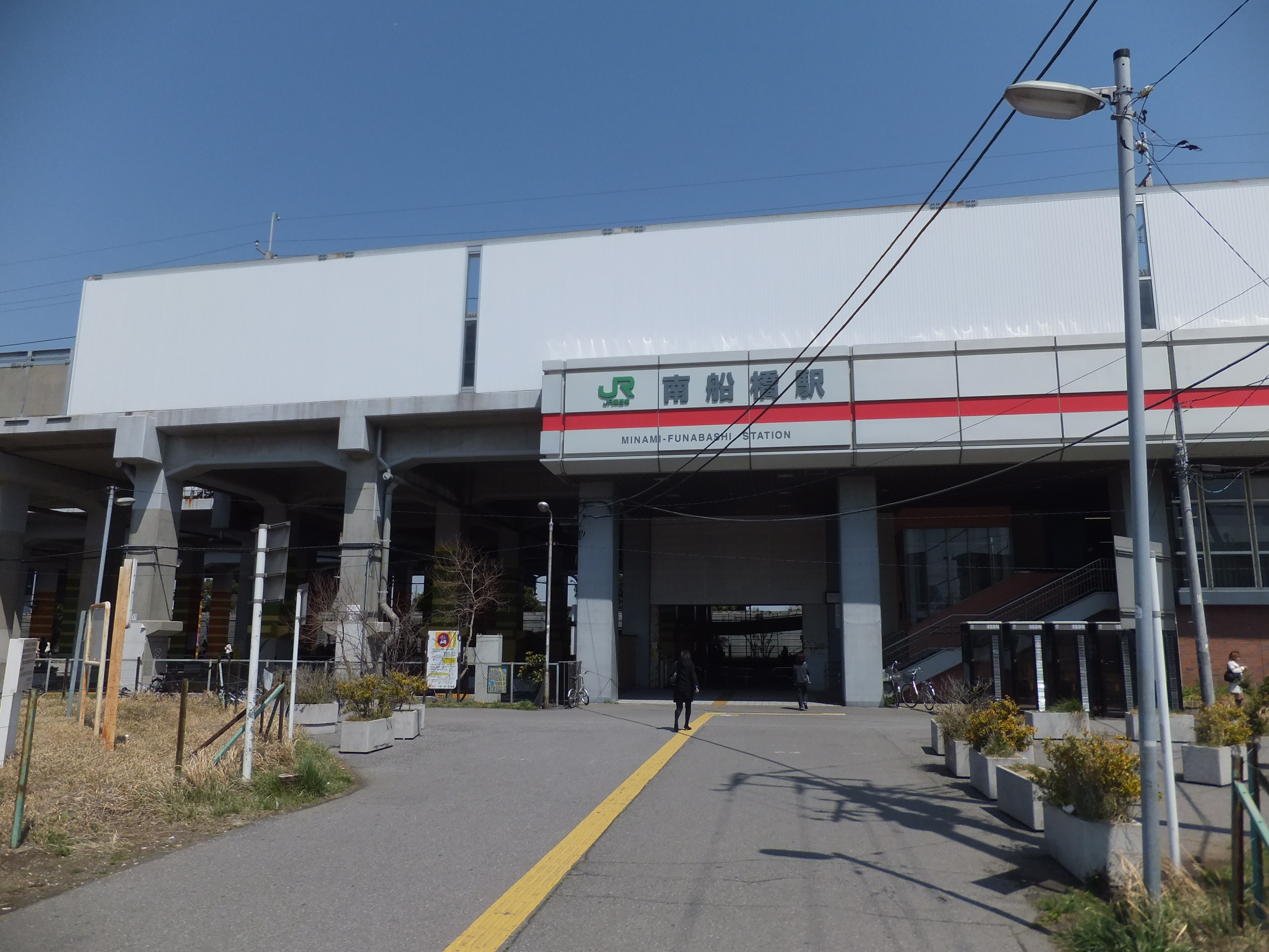 京葉線南船橋駅